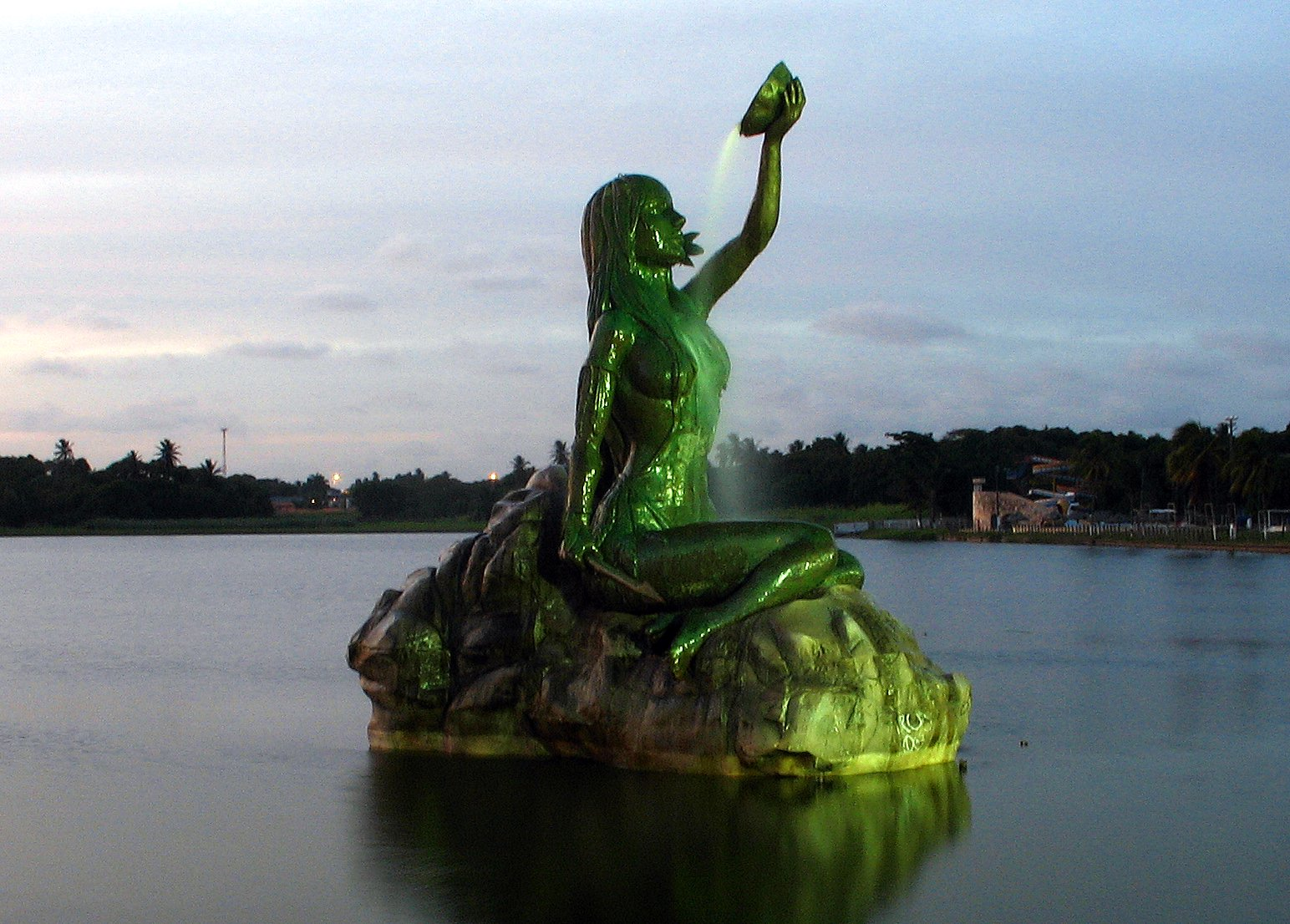 Estatua de Iracema da lagoa da Messejana